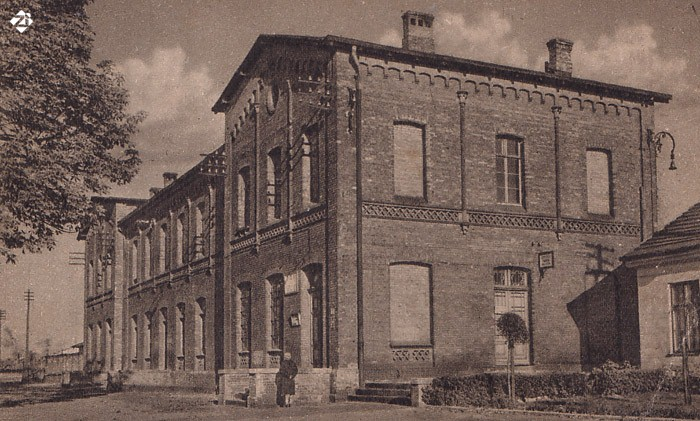 Dawny wygląd dworca w Ząbkowicach